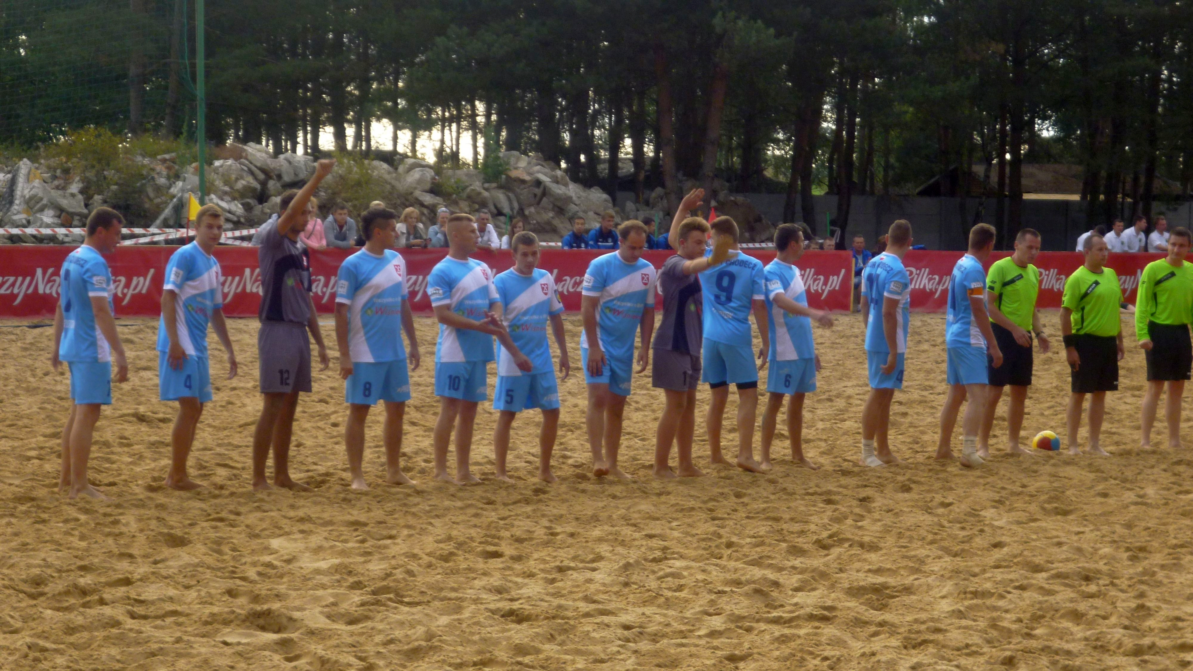 I liga piłki nożnej plażowej, Chodecz 2015. Drużyna gospodarzy, Zgoda Chodecz Beach Soccer Team.